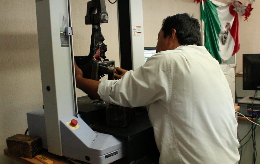 Medición de calidad de calzado industrial de acuerdo a la NOM-013-STPS-2009